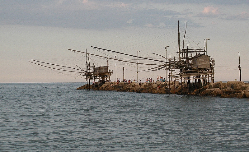 Ortona